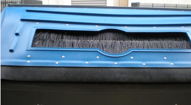 Tapa de un contenedor unida mediante remaches ciegos con mandril de estiramiento